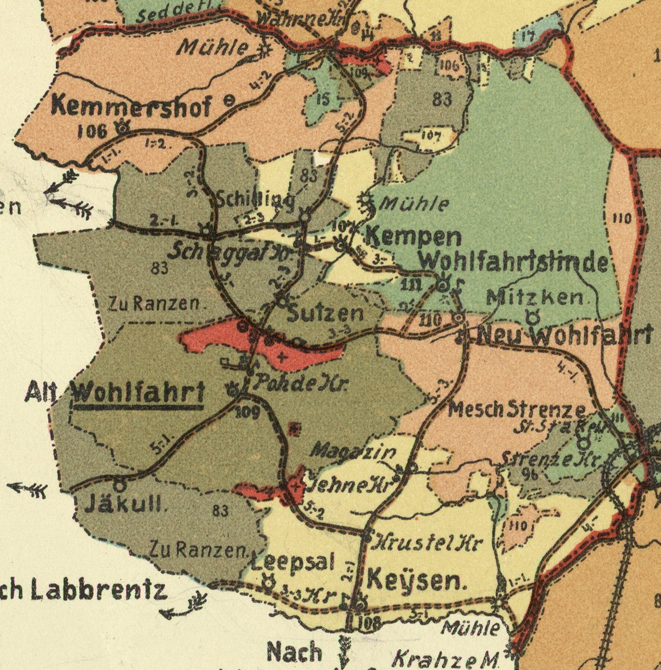 Ēvele kihelkonna mõisad 1904. aasta kaardil.